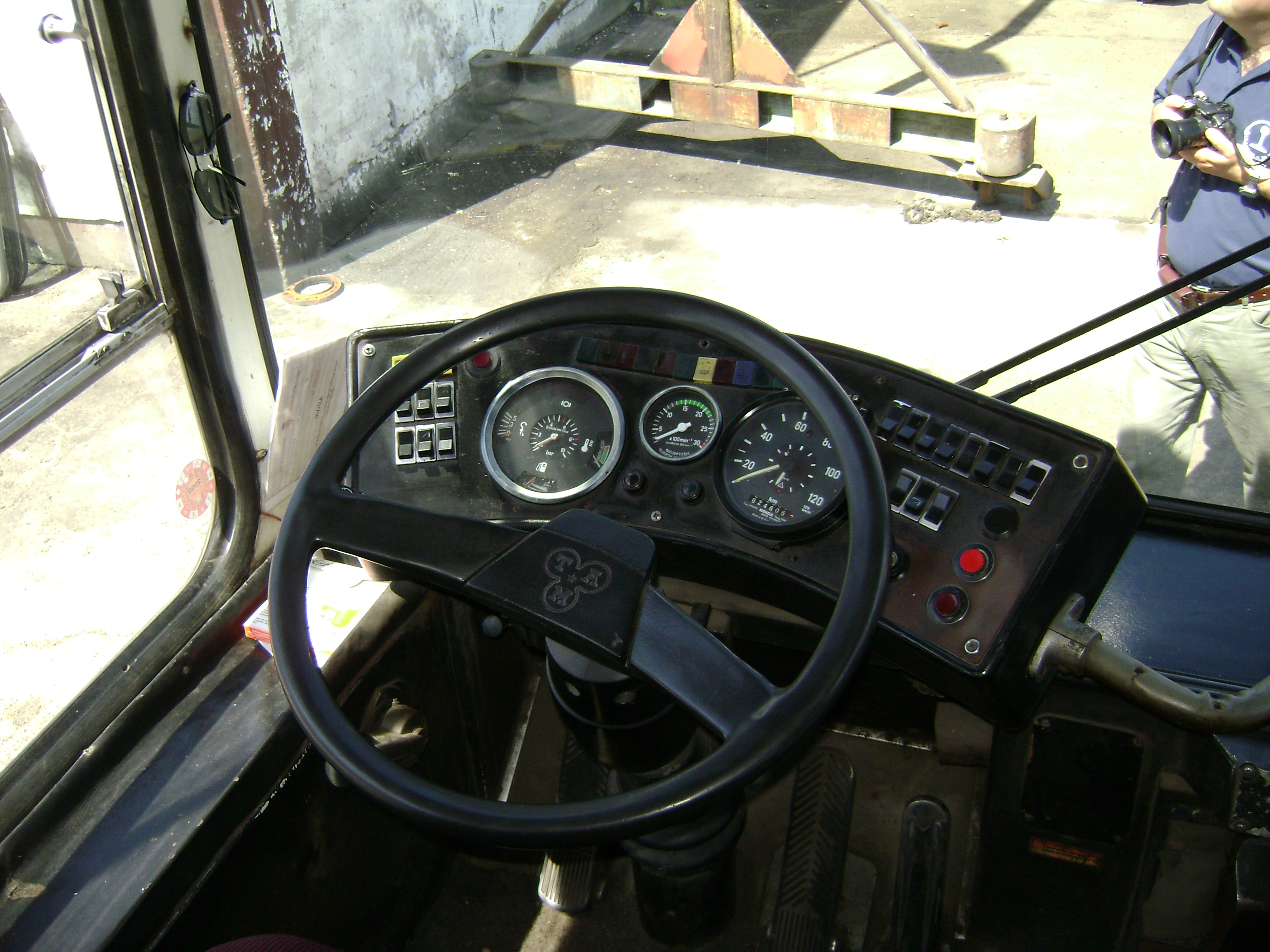 Unutrašnjost TAM 260 A 116 P